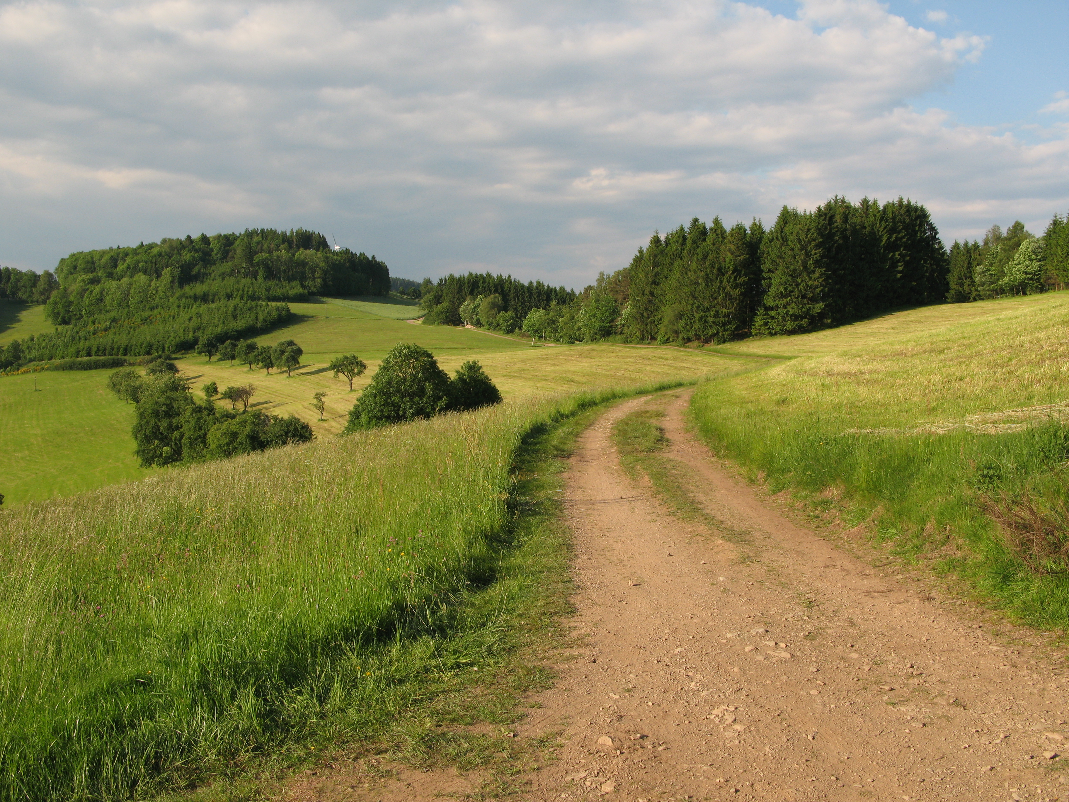 Auf dem Zweitälersteig in der Nähe des Schwarzenbergs im Schwarzwald